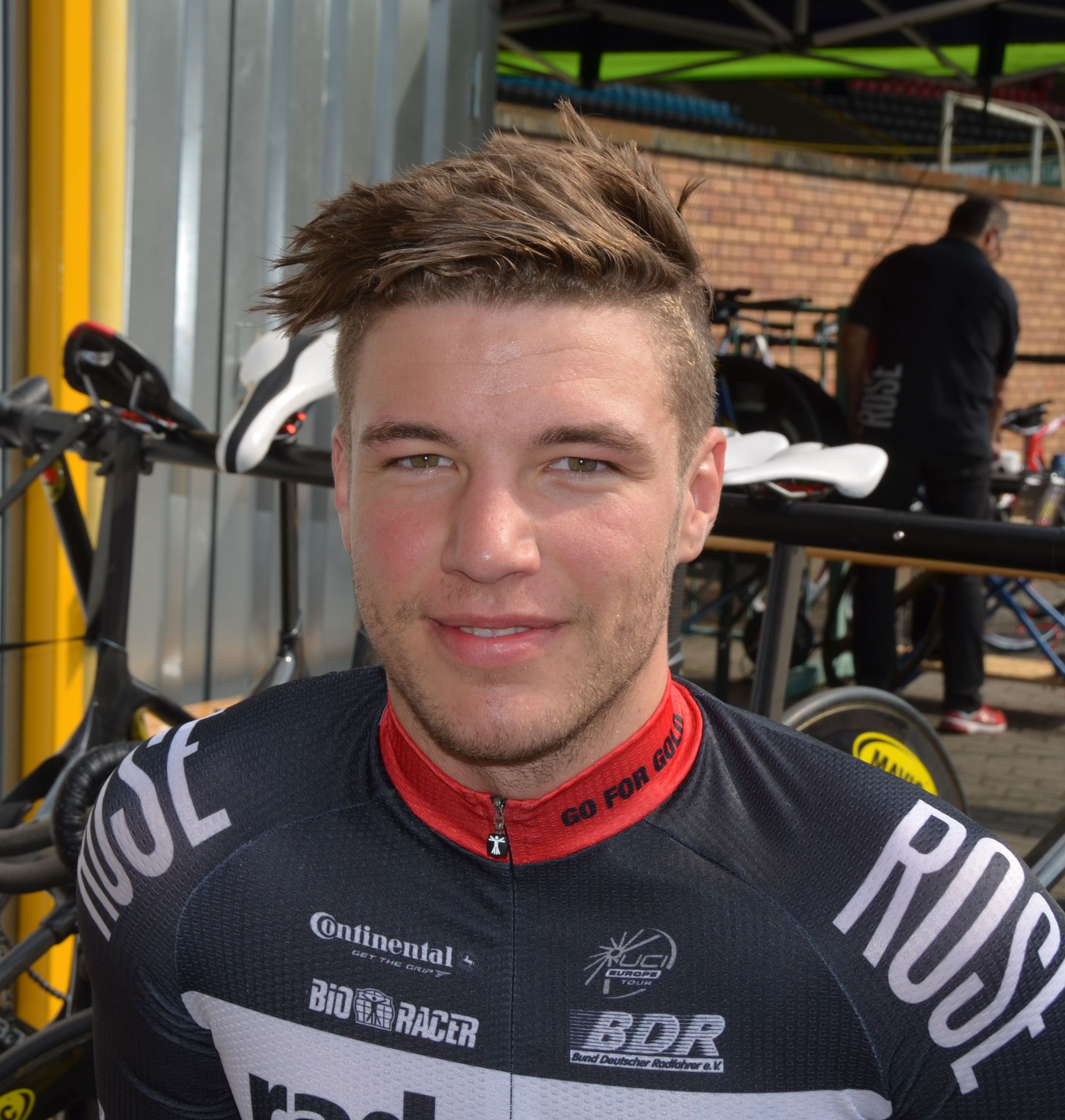 Domenic Weinstein, deutscher Radsportler